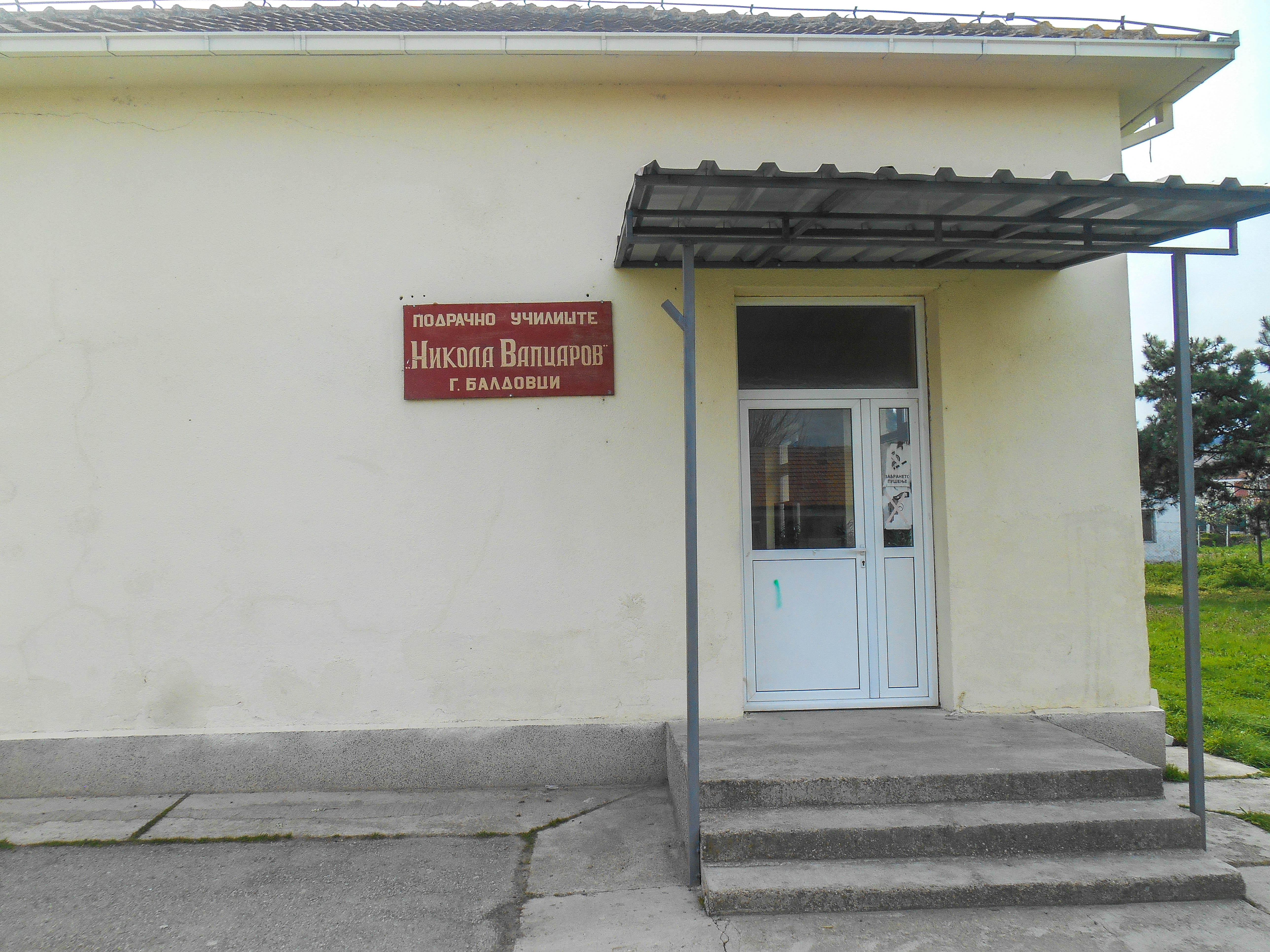 Црквата Свети Никола во Градско Балдовци